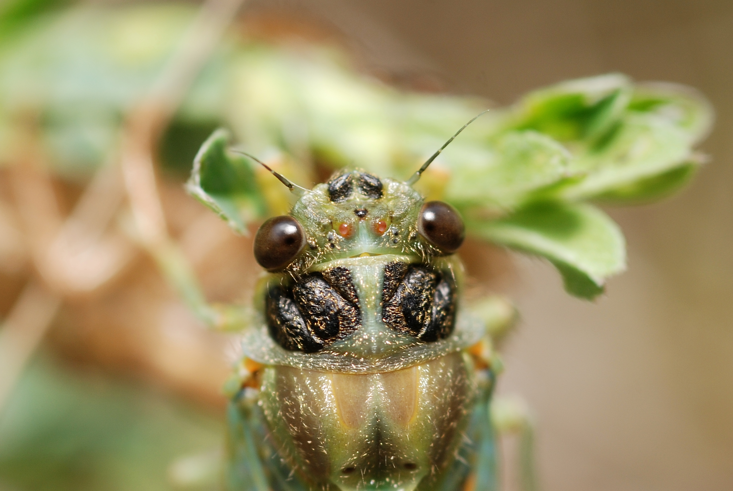 Cicadetta montana